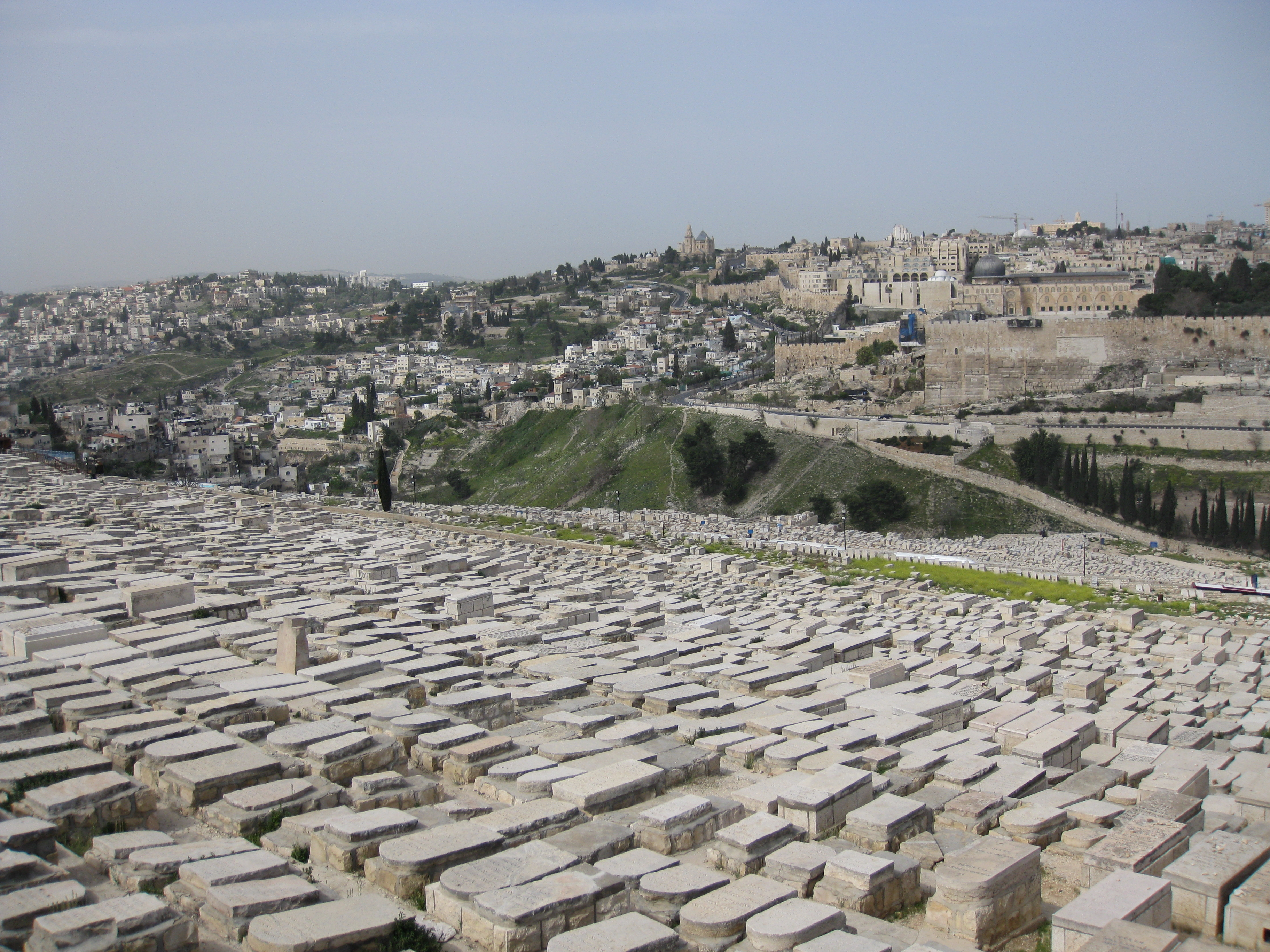 הר הזיתים Mount of Olives בית הקברות היהודי בהר הזיתים